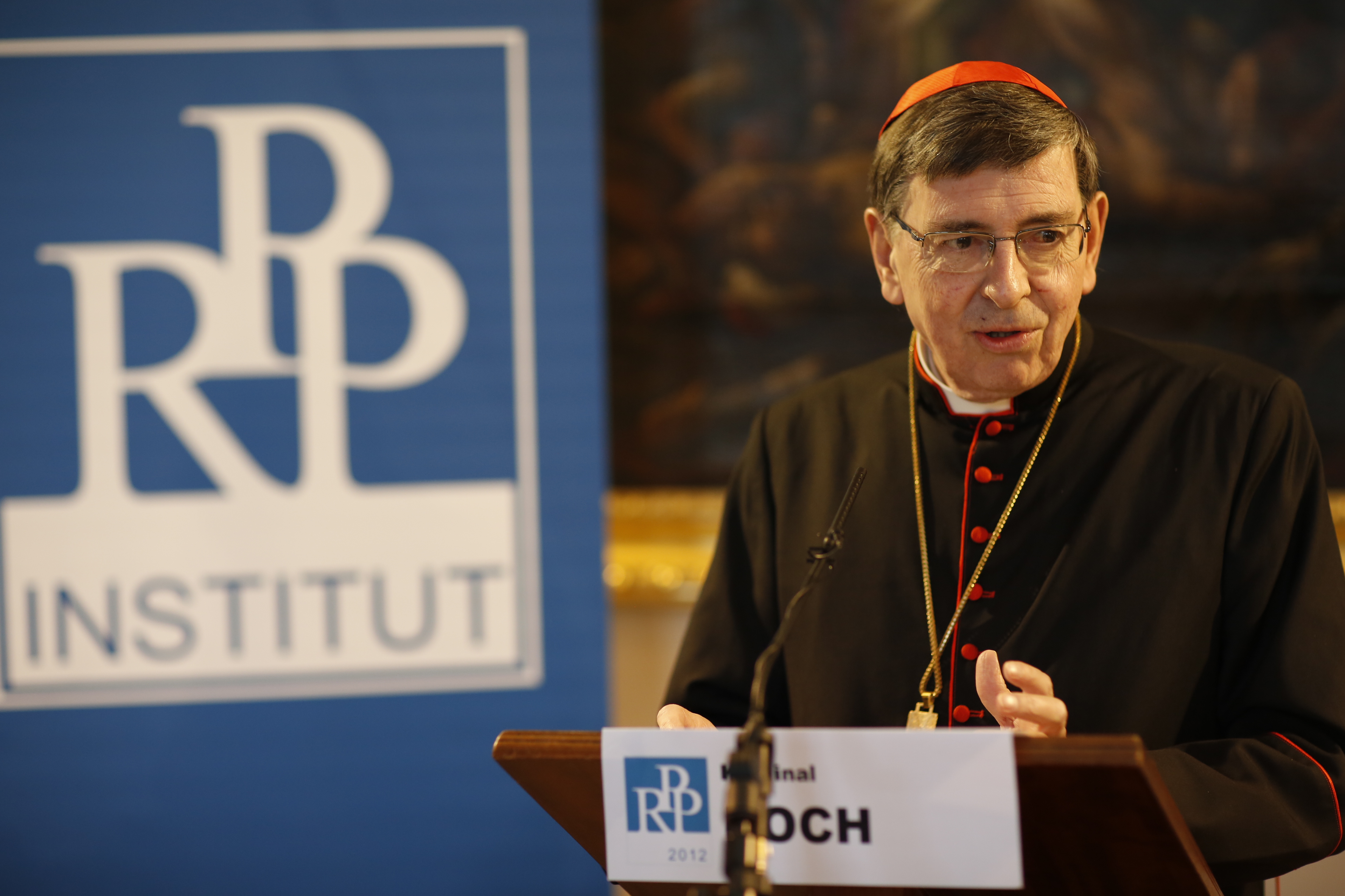 Kurt Koch (Kardinal) auf der Fachtagung des RPP-Institutes über "Selbstverwirklichung & Gehorsam" am 7. Dezember 2012 im Kaisersaal des Stiftes Heiligenkreuz